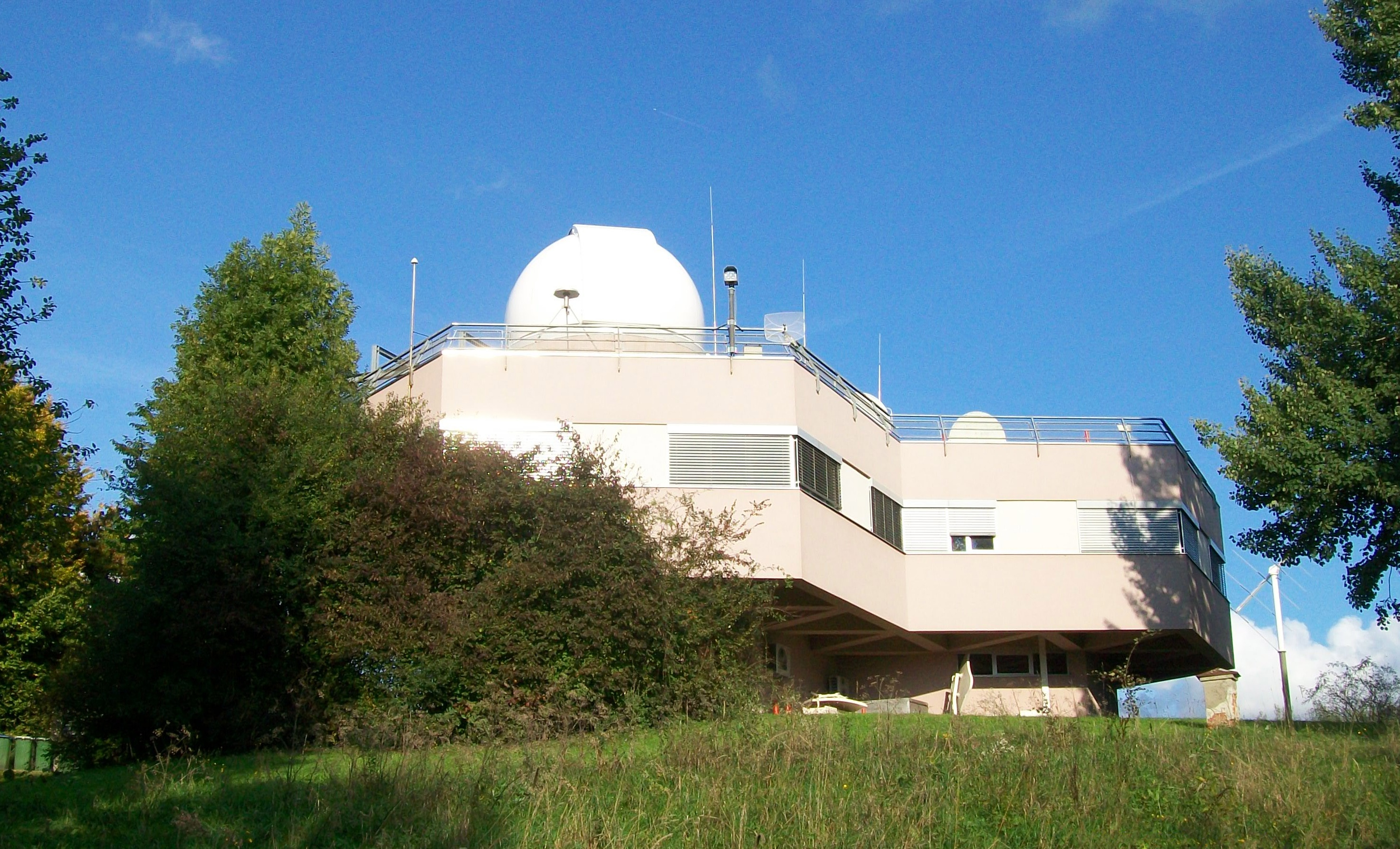 Satellitenstation Graz-Lustbühel Außenansicht